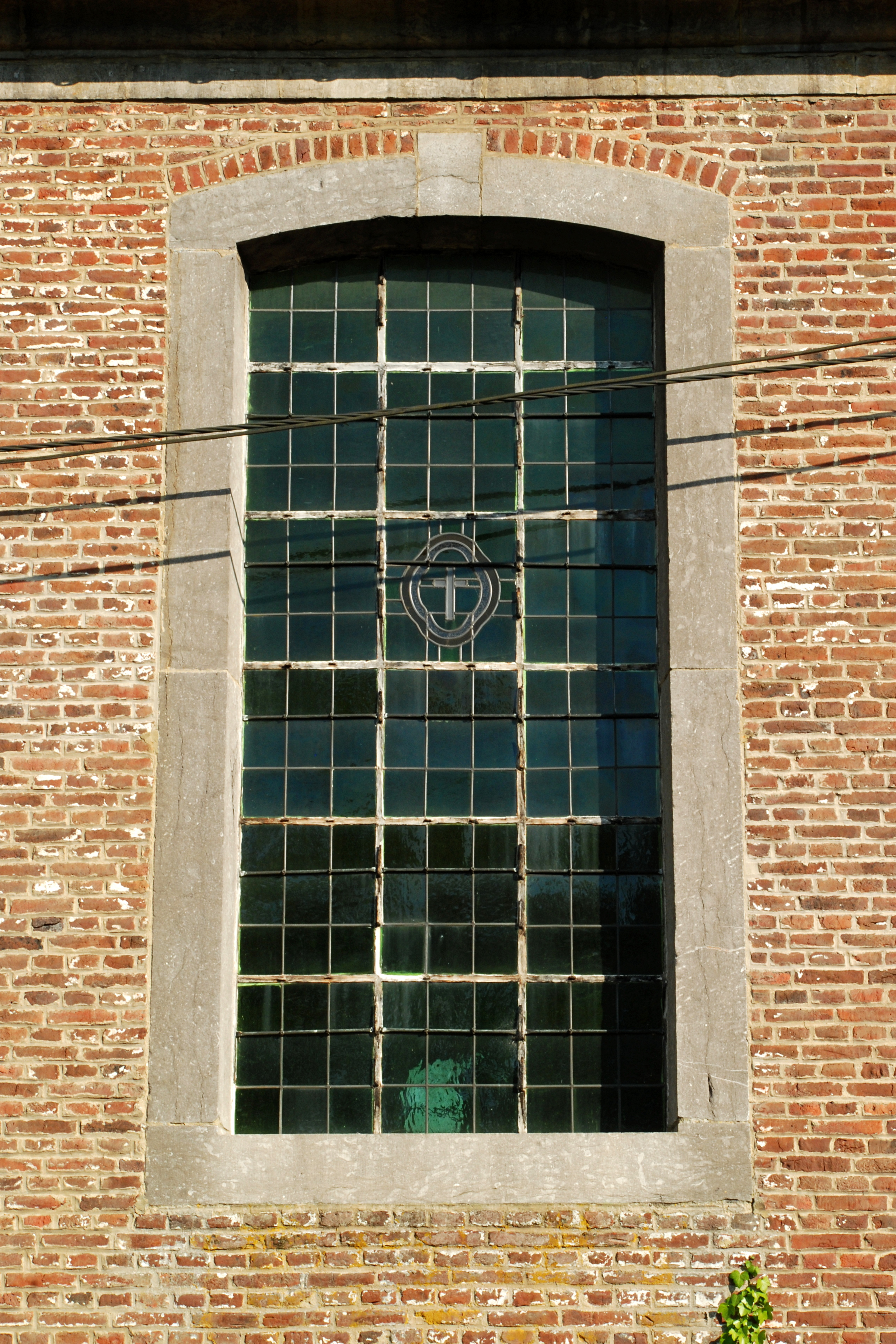 Belgique - Brabant wallon - Église de Court-Saint-Étienne